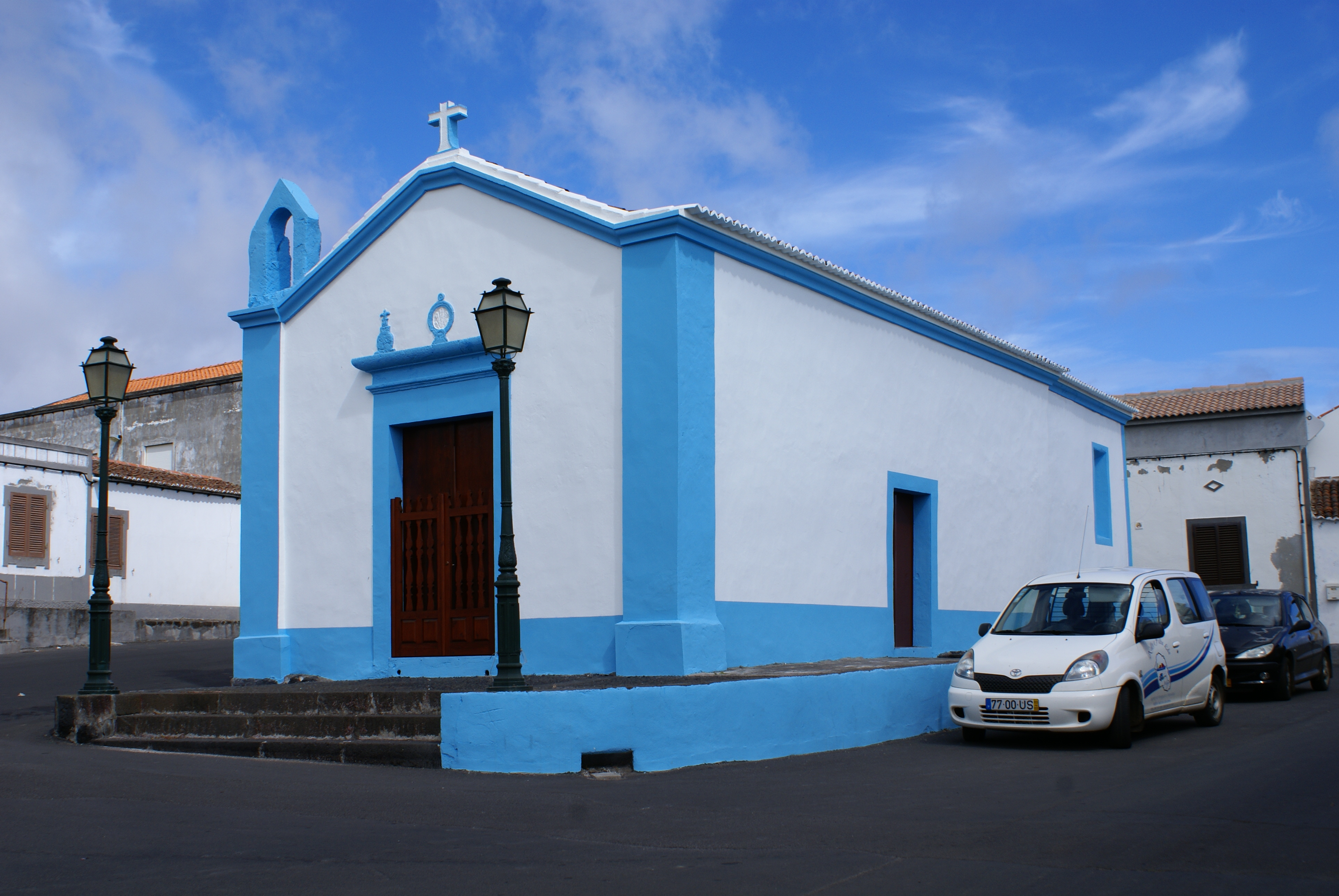 Ermida de Nossa Senhora da Guia, junto ao Porto da Praia, ilha Graciosa, Açores, Portugal